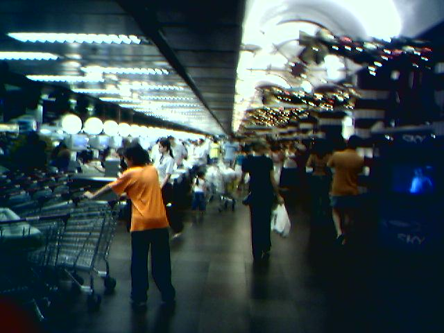 Descrição Minha foto quando fui ao Zaffari Bourbon em Canoas.